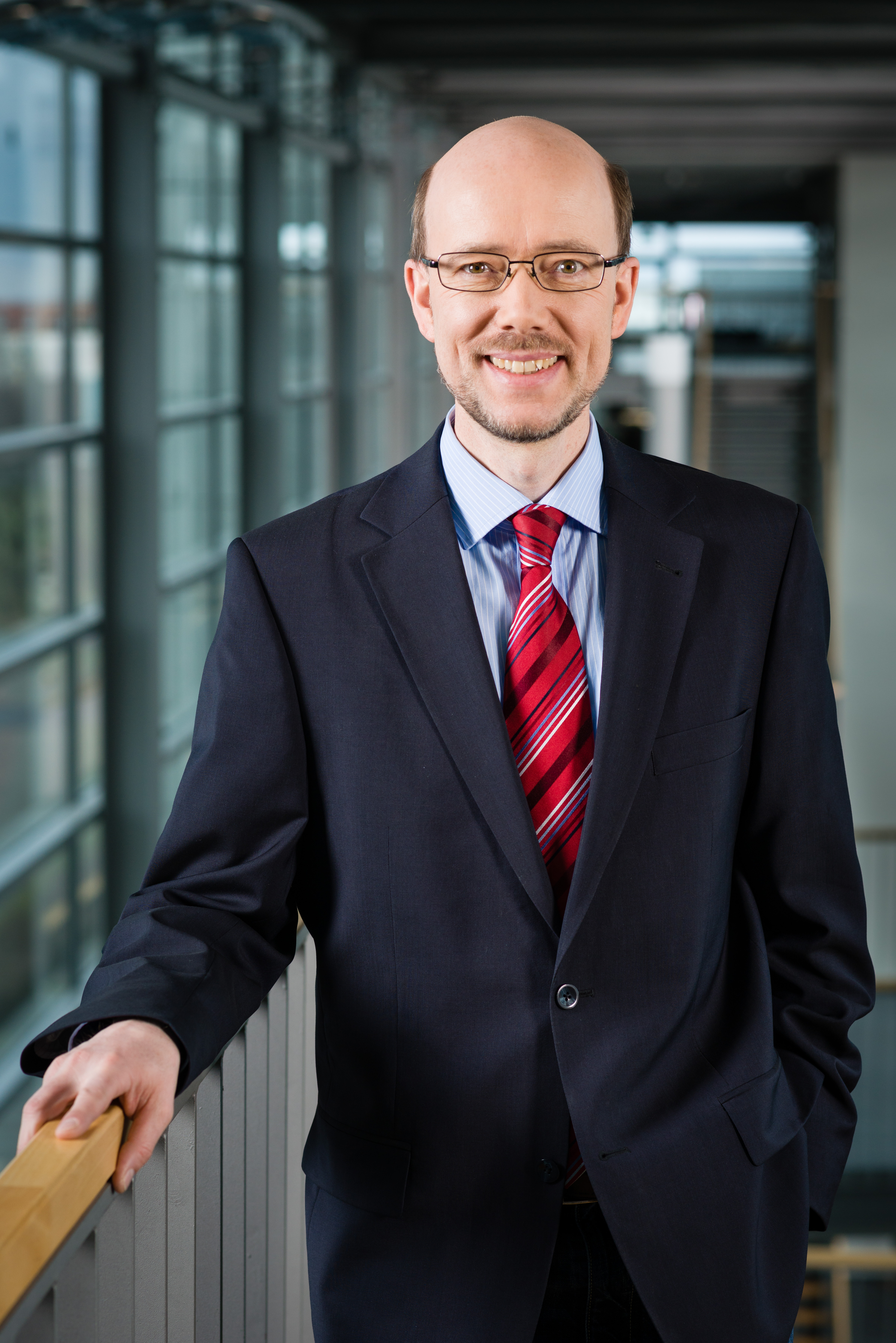 Prof. Dr.-Ing. Kai Sundmacher, Leiter der Fachgruppe Prozesstechnik am Max-Planck-Institut für Dynamik komplexer technischer Systeme / 2014